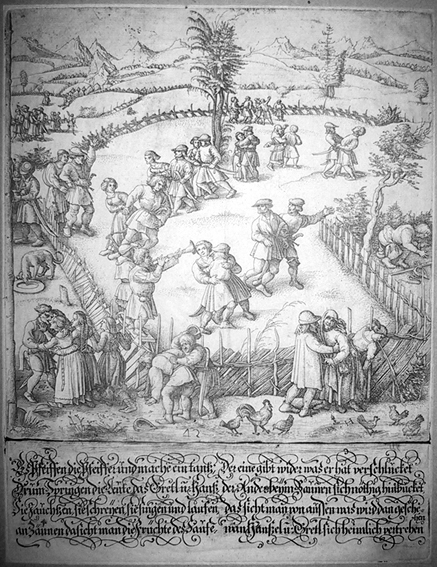 Hopfer, Daniel (ca 1470-1536): “Der Jahrmarkt (Peasant’s Fair, the right-hand plate, Holl.83 iii/iii, with Funck number 42), rechter Teil. Eisenradierung/etching auf Butten. 31,5 x 24,2 cm. In der Platte monogrammiert. Hollstein 83 III (von III). - Spaterer Abdruck mit schmalem Randchen. - Rechts gebraunt, mit 2 geglatteten Knicken.”